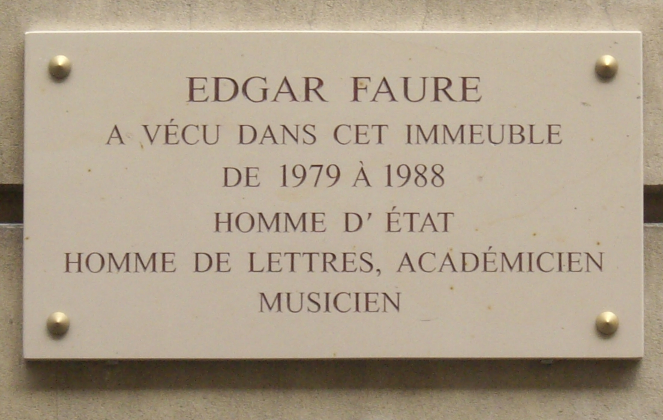 Plaque apposée au n° 134 de la rue de Grenelle, Paris 7e, où vécut l'homme politique et académicien Edgar Faure (1908-1988) de 1979 à 1988.